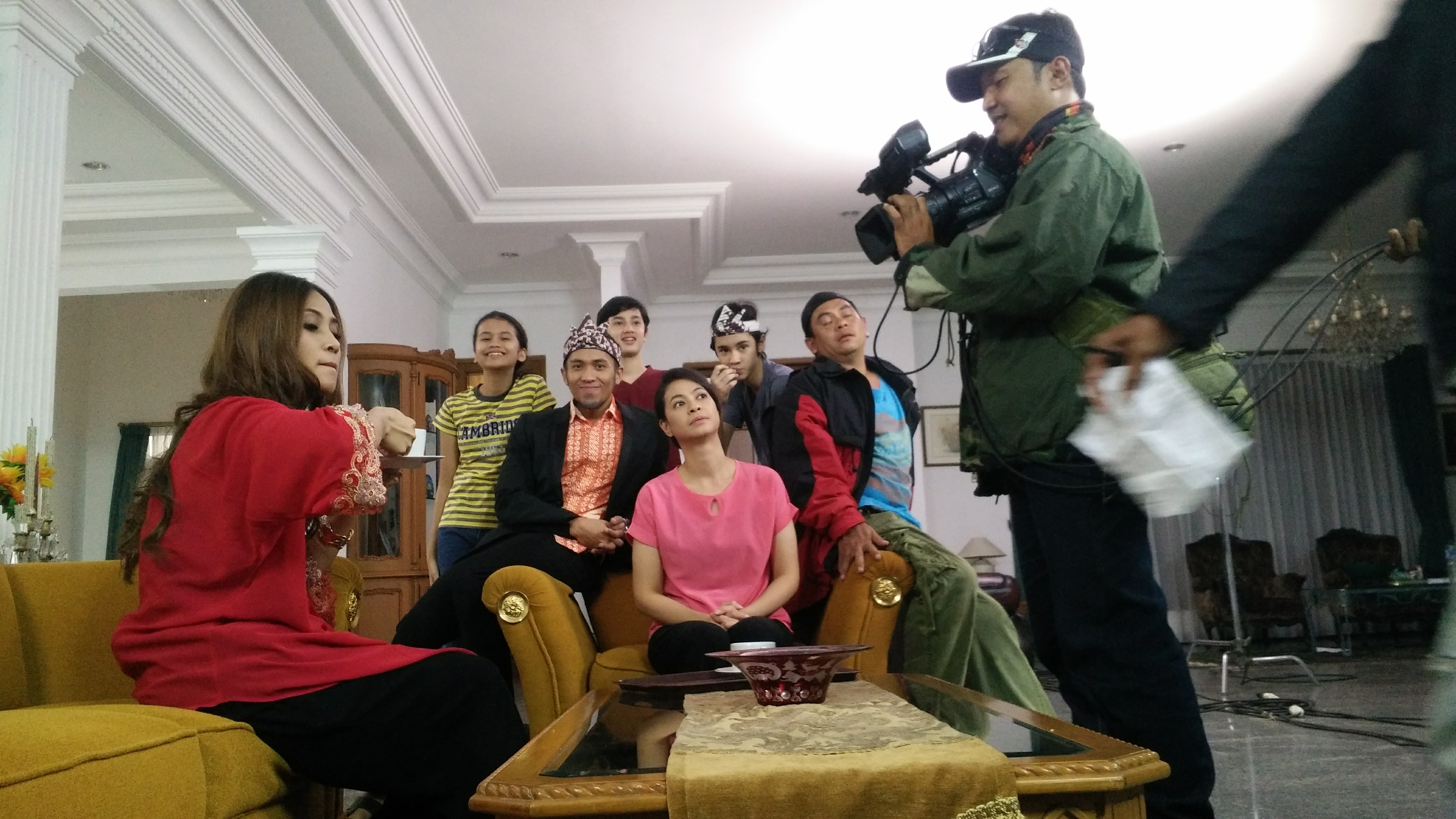 cuplikan scene saat shooting FTV ciung wanara produksi LUNAR JAYA FILM